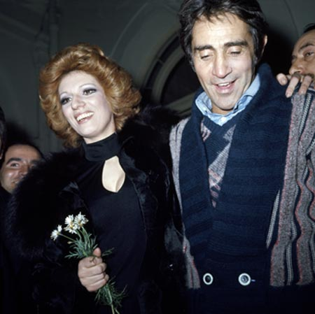 Iva Zanicchi con Walter Chiari a San Remo nel 1974.